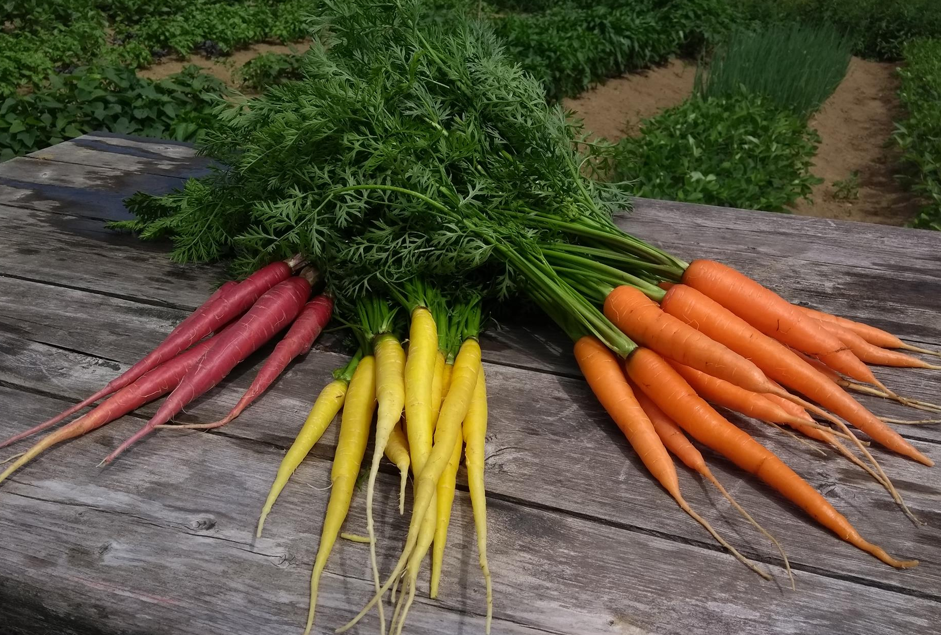 Carottes variées